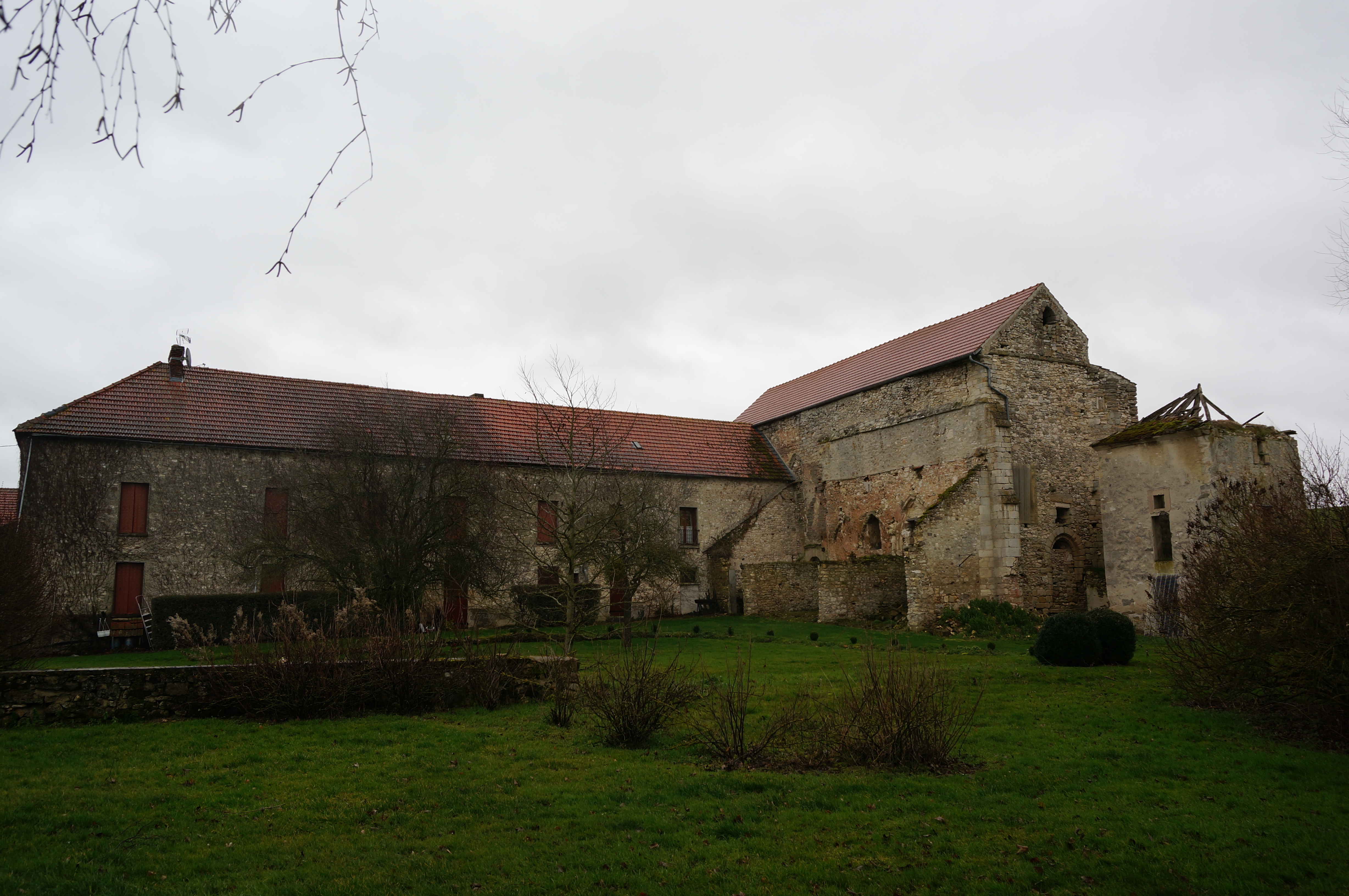 La ferme du temple de passy grigny.